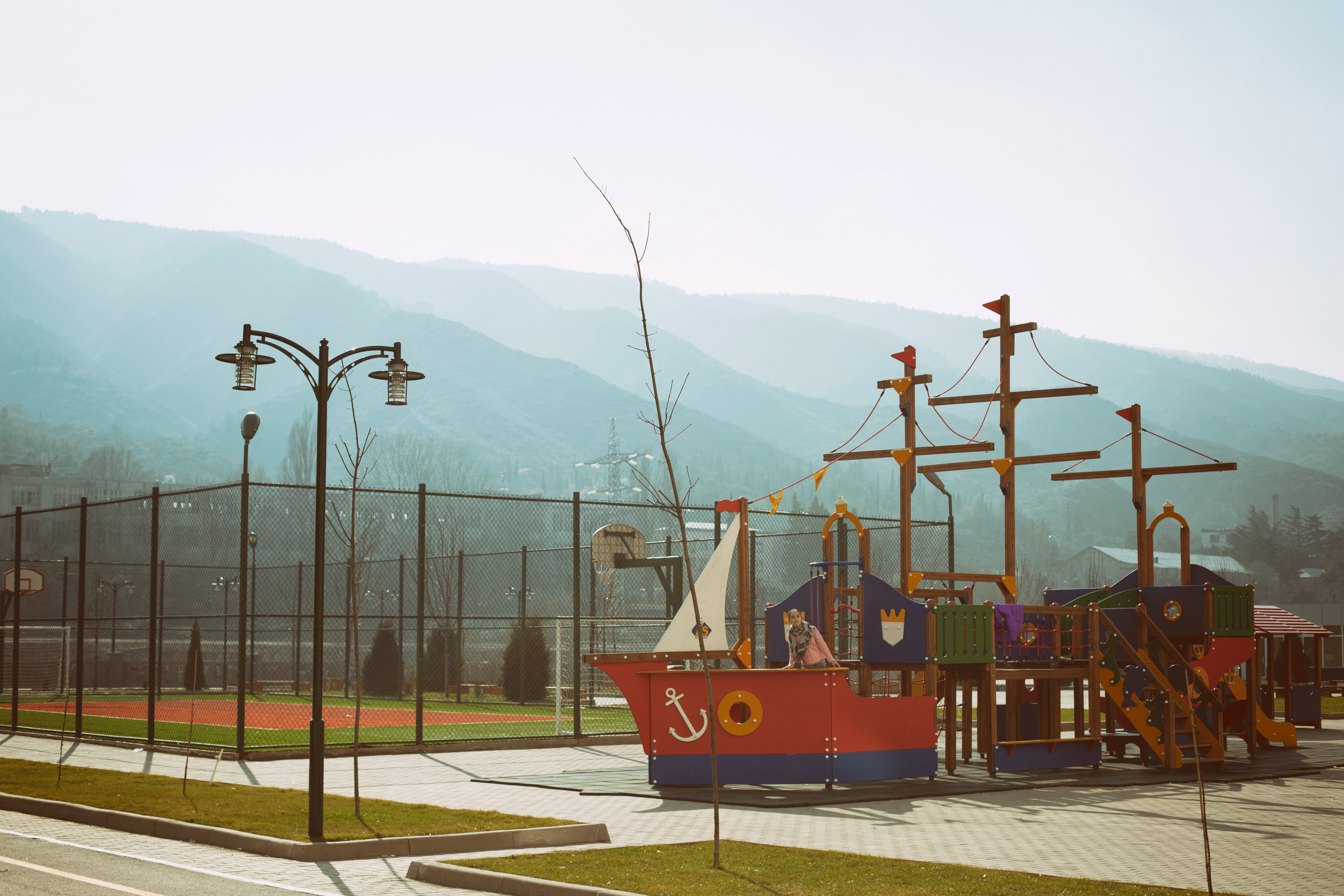 დირსის საბავშვო გემი